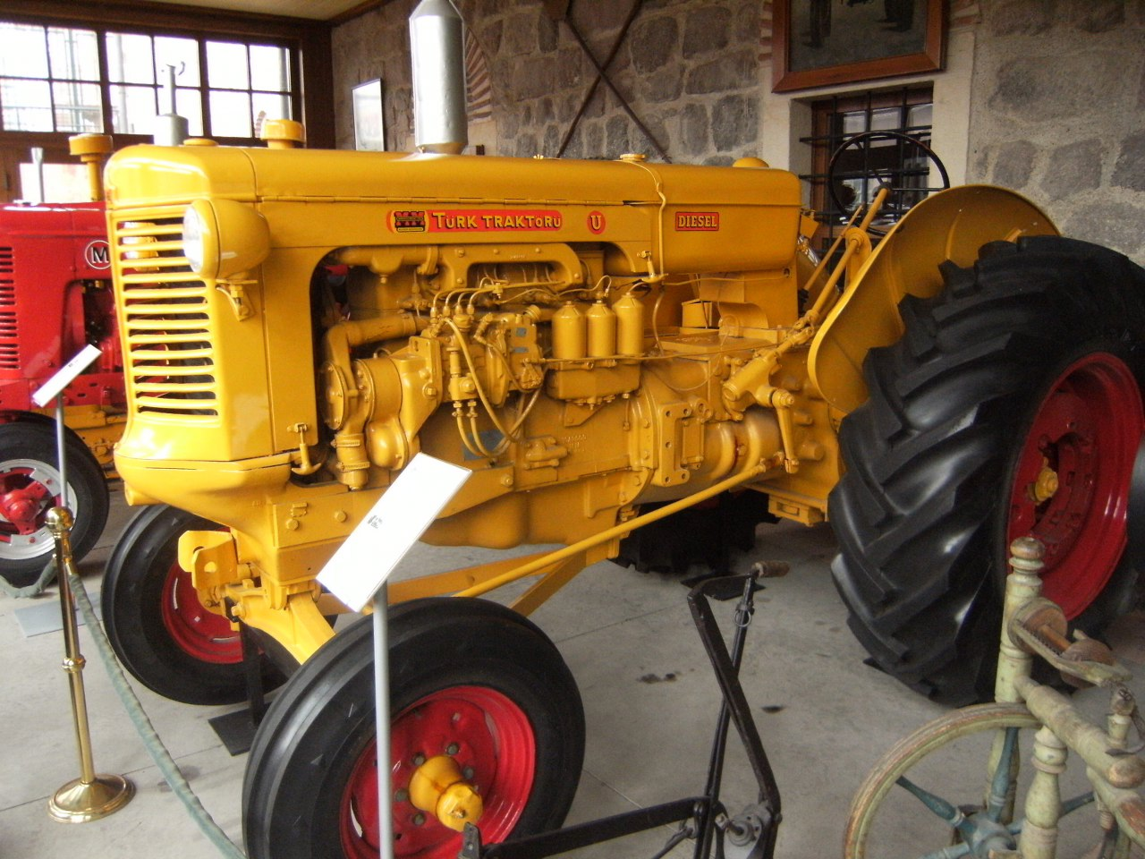 Minneapolis Moline Türk tarafından üretilen UTSD modeli. Model Ankara Çengelhan Rahmi Koç Müzesi'nde sergilenmektedir